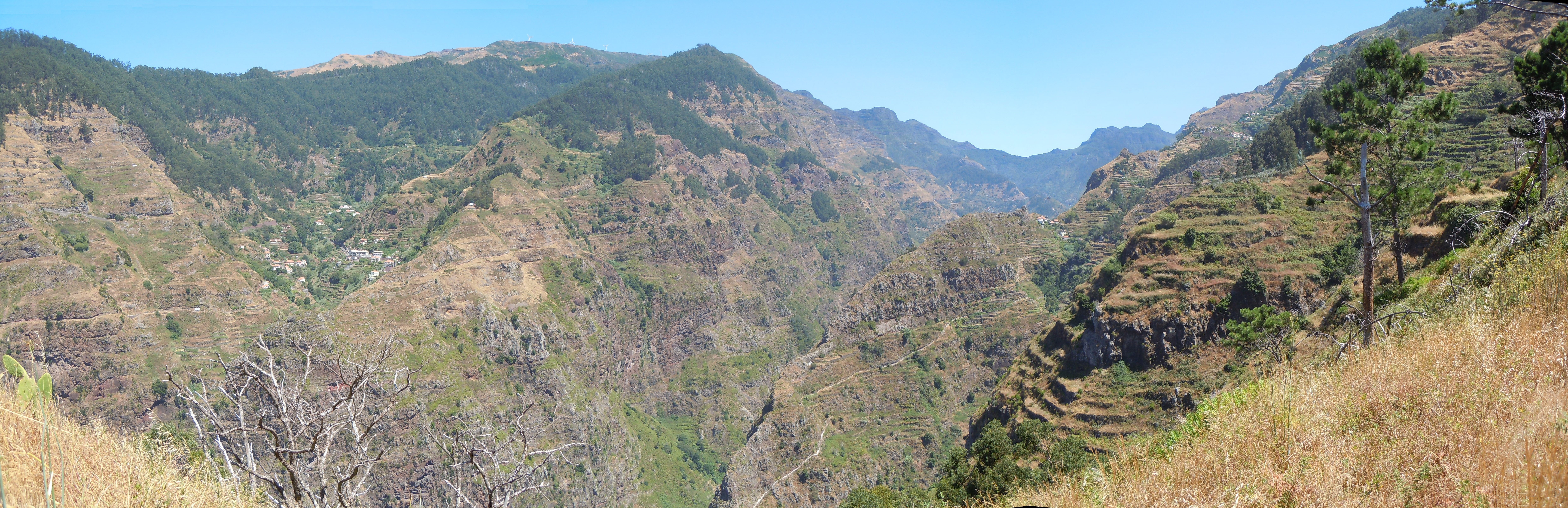 Vallée de Vale da Ribeira Brava depuis la Levada do Norte, vers Eira do Mourão : vue sur Furnas et Pico Queimado